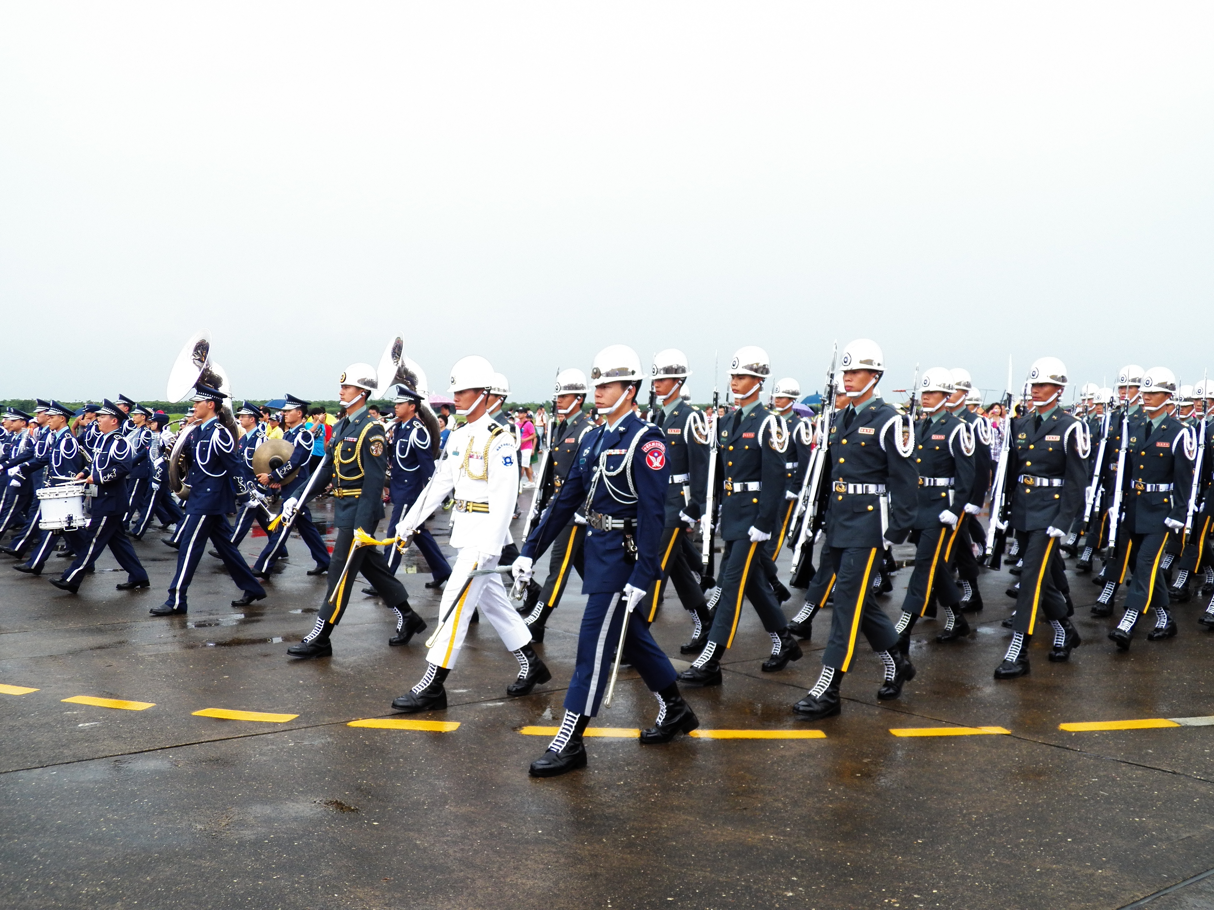 2012年空軍嘉義基地營區開放活動，三軍儀隊隨空軍樂隊之後進場，即將展開操演。